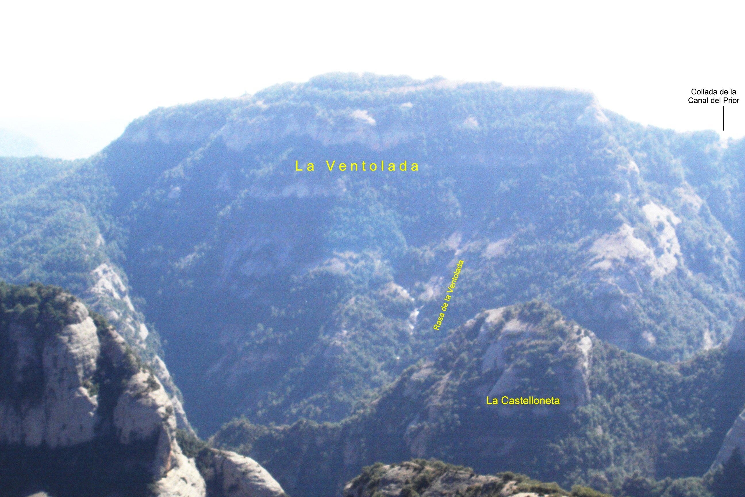 La Ventolada, la rasa de la Ventolada, la Castelloneta i el clot de Vilamala des de Fenarals